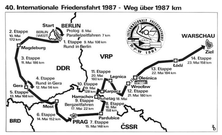 Friedensfahrt, Karte, Streckenführung ADN-ZB Grafik 18.4.87 Berlin: Vorbereitung 40. Internationale Friedensfahrt Berlin-Prag-Warschau-Die Gesamt-Streckenführung der Jubiläumsfahrt 1987 vom 8. bis 23. Mai über 1 987 Kilometer.